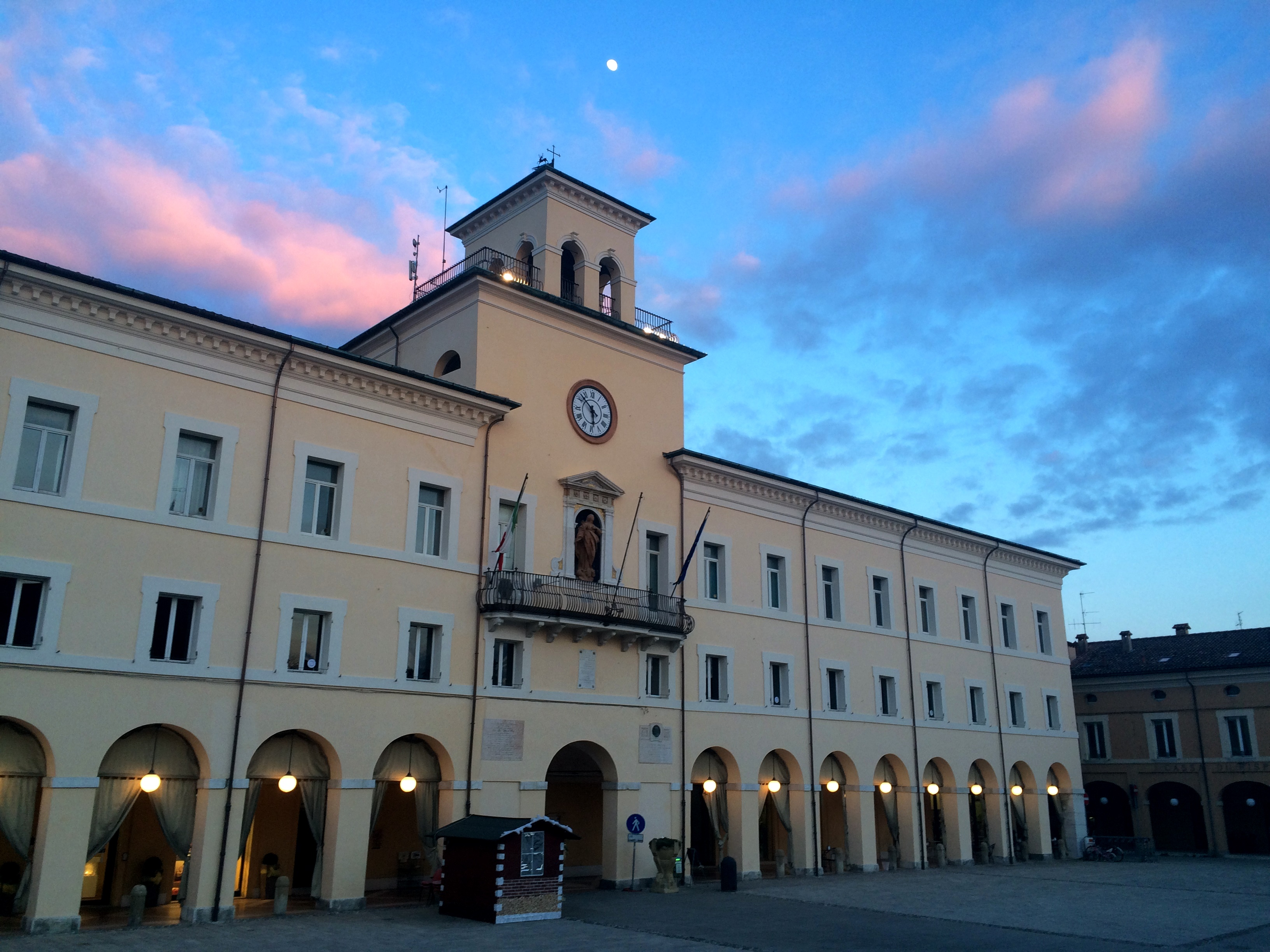 Municipio di Cervia